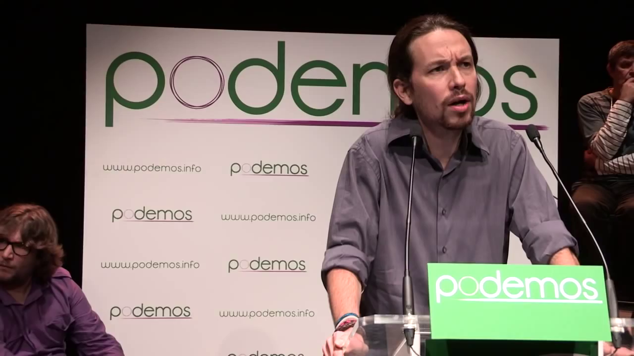 Presentación de Podemos en Madrid (16 de enero de 2014)